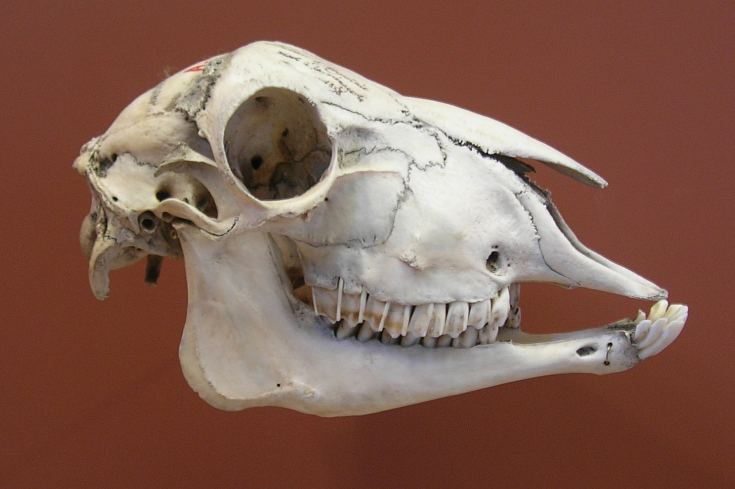 Sheep skull.Museum d'histoire naturelle.Paris.